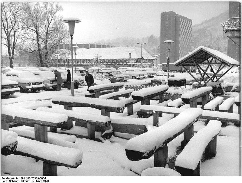 Suhl, Stadtzentrum, Winter ADN-ZB Schaar 19.3.1978-Suhl: Winteridyll im Stadtzentrum von Suhl. Zwei Tage vor dem Frühlingsanfang ist in Thüringen noch einmal der Winter eingekehrt.